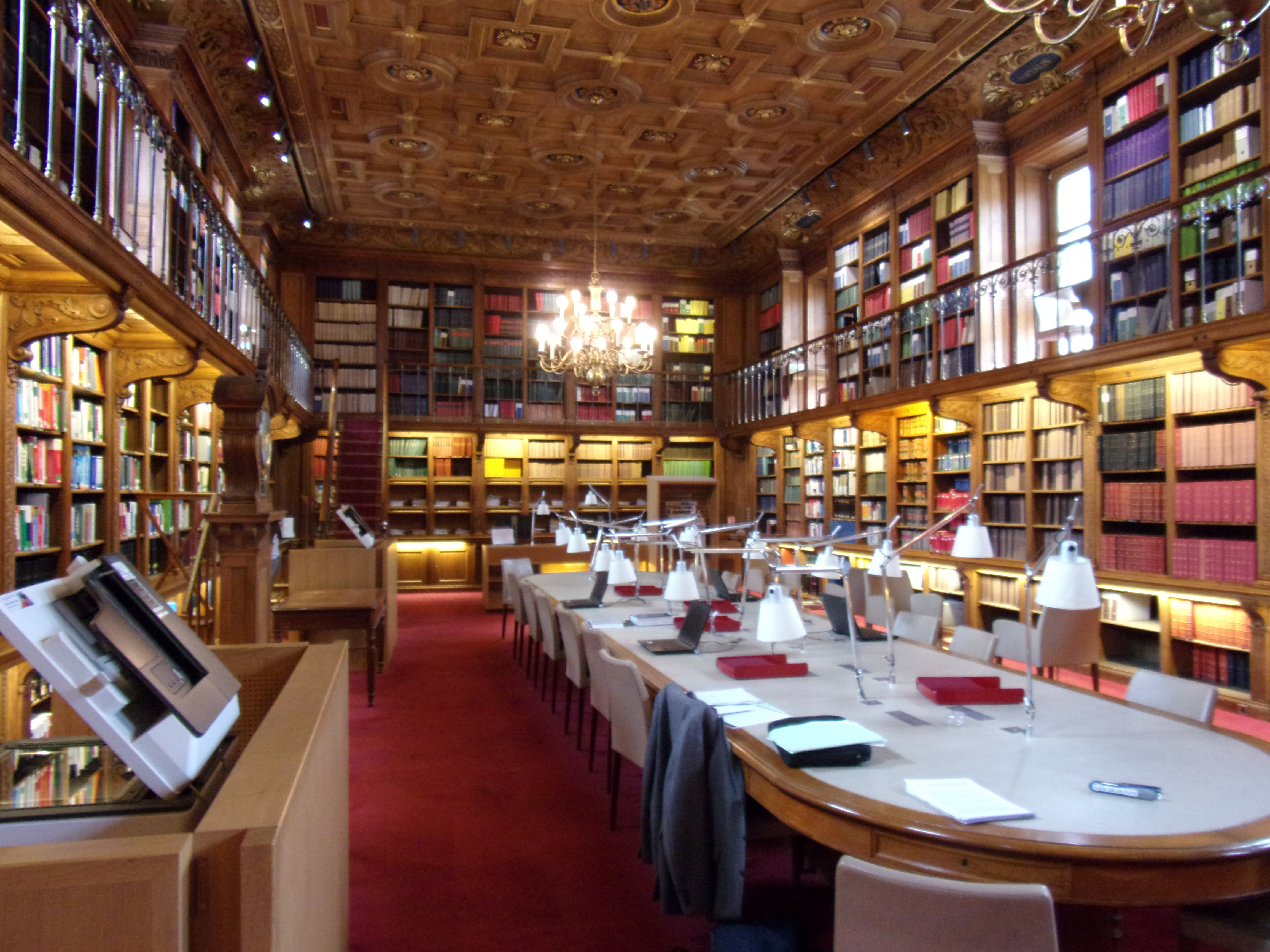 Bibliothèque de la Cour de cassation française, vue depuis l'entrée. Photo prise le 14 juin 2019.